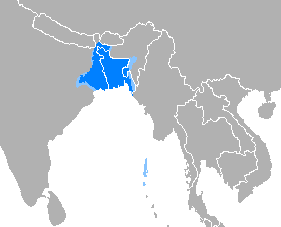 Donde es mayoritario Donde es minoritario